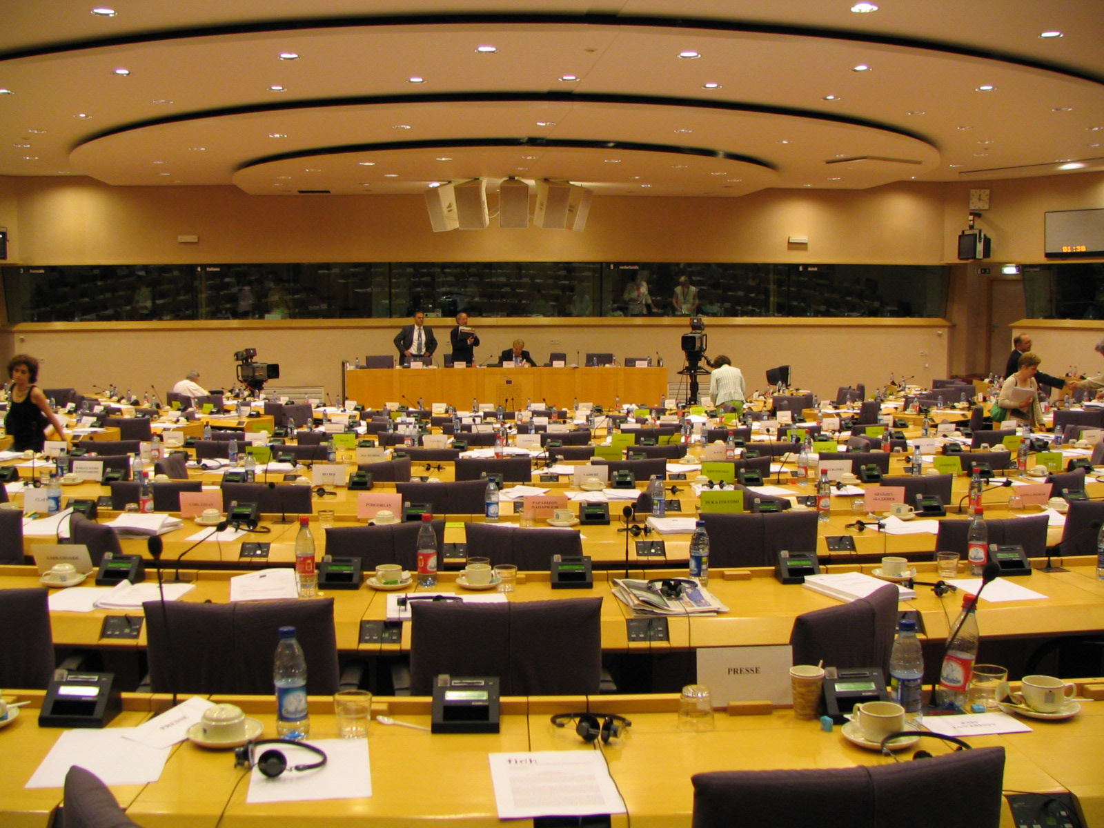 Anna-Lindh-Saal des Europäischen Parlamentes in Brüssel kurz nach dem Ende einer Sitzung des Auswärtigen Ausschusses. Am Tisch ganz hinten ist noch der Vorsitzende zu sehen. Im Hintergrund die Kabinen der Übersetzer. Die Schilder mit schwarzer Schrift auf weißem Grund benennen die Mitglieder des Ausschusses, schwarze Schrift auf grünem Grund sind die stellvertretenden Mitglieder. Die rosa Schilder sind die Beobachter aus Bulgarien und Rumänien; beide Länder sollten planmäßig am 1. Januar 2007 Mitglieder der EU werden. Die anderen Plätze sind für die Presse und für Zuschauer bestimmt, da die Ausschüsse des Europäischen Parlamentes öffentlich tagen. Foto von Matthias Friehe